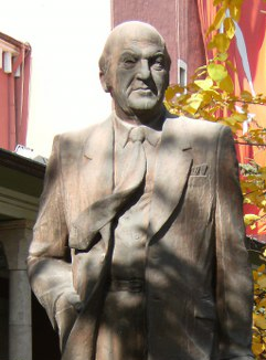 Ankara bulunan Cüneyt Gökçer Anıtı